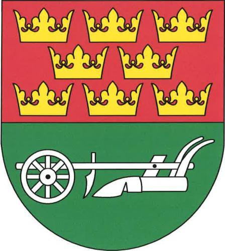 Znak obce Řehlovice